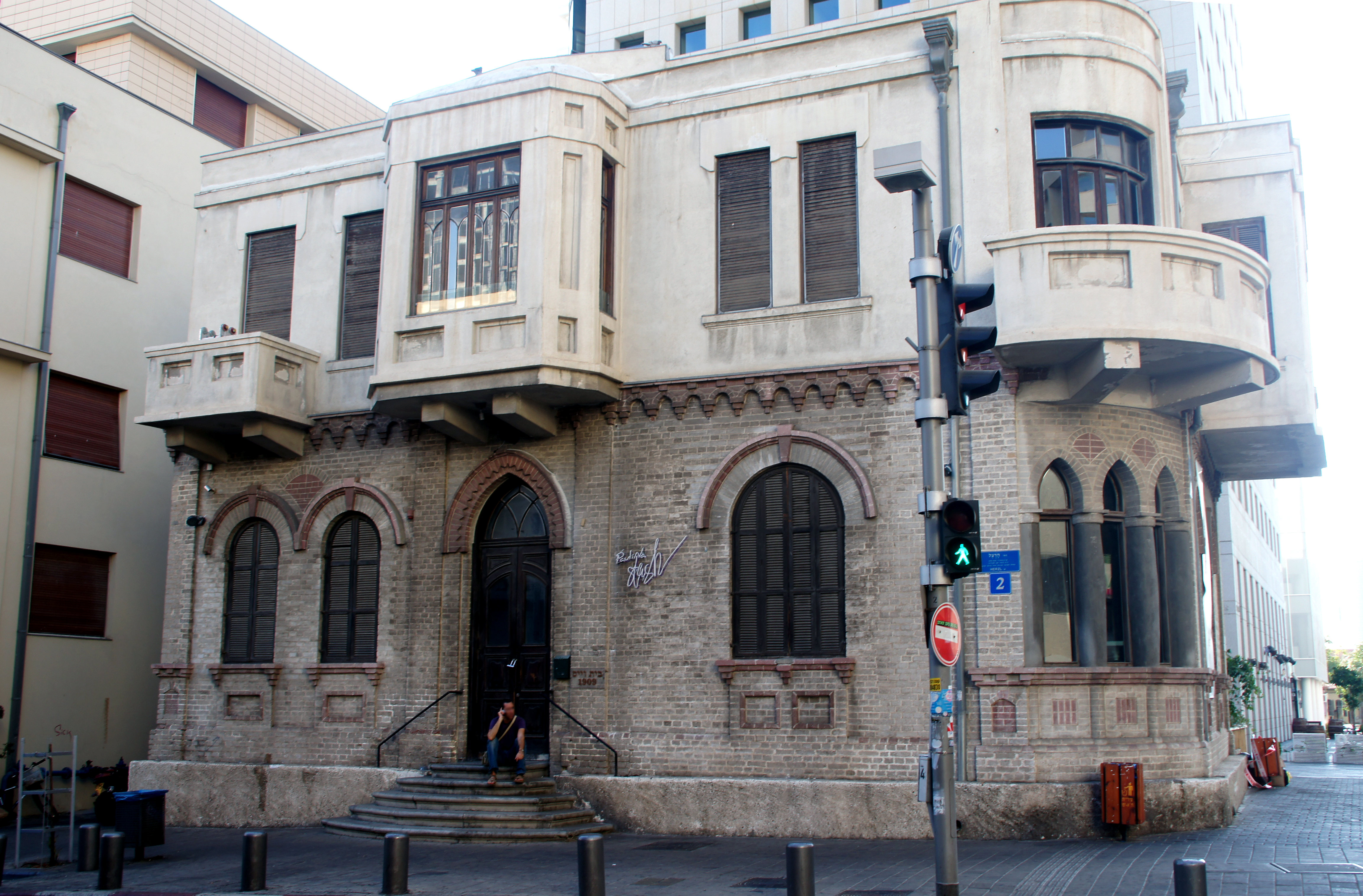 בית וייס הוא מבנה בפינת הרחובות הרצל ואחד העם בתל אביב-יפו, שהיה שייך במקור לעקיבא אריה ויס האב המייסד של תל אביב ויושב ראש הראשון של אחוזת בית. בנייתו החלה בשנת 1909 והסתיימה בשנת 1910. בתחילה היה הבית בן קומה אחת שבה שישה חדרים ועליית גג, ובשנת 1927 נוספה לו קומה נוספת.